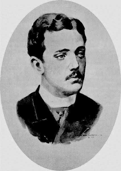 Príncipe D. Pedro Augusto, filho primogênito da Princesa Leopoldina, neto mais velho de D. Pedro II. Foto sem data